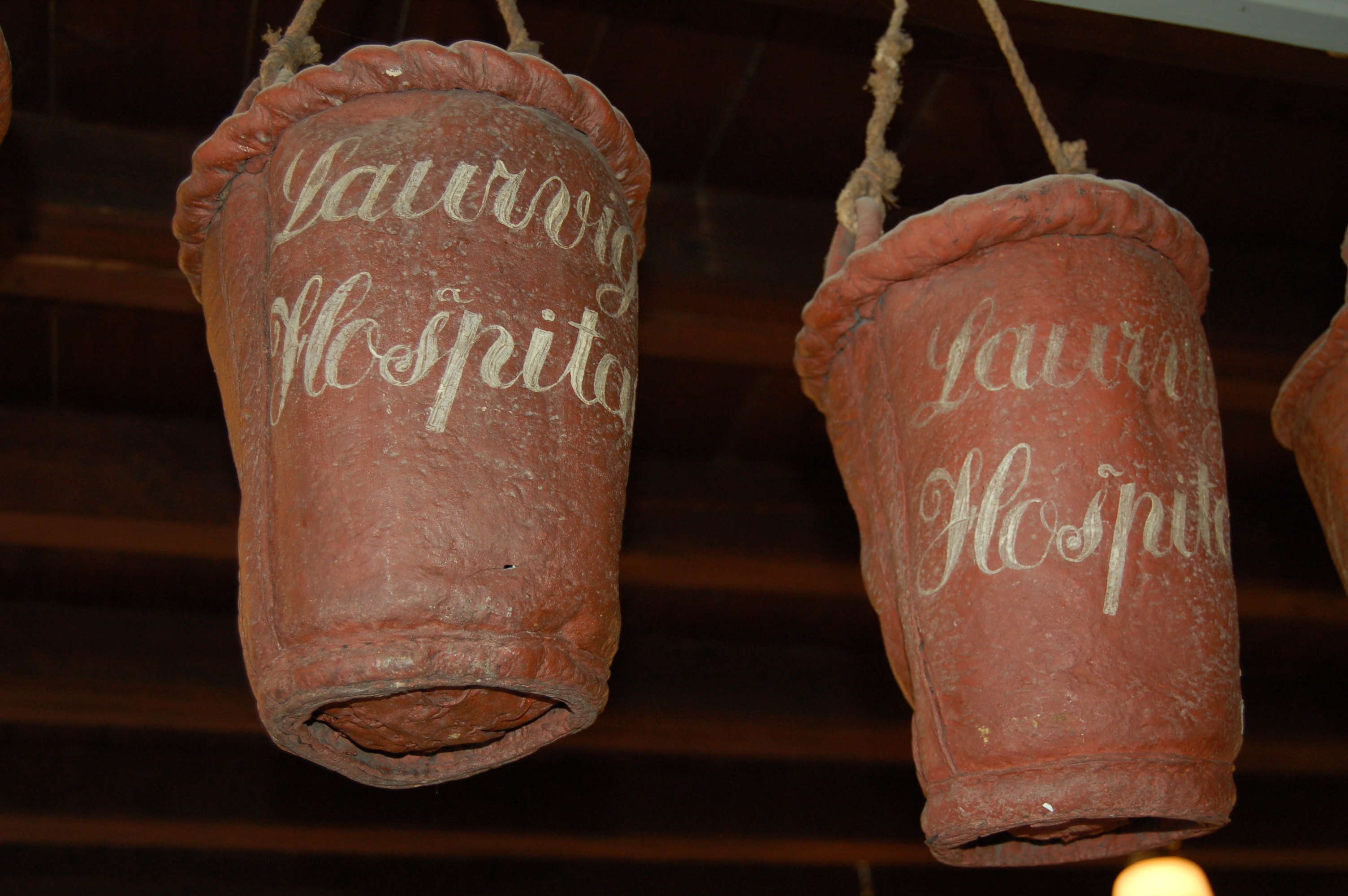 Bøtter for å slukke brann